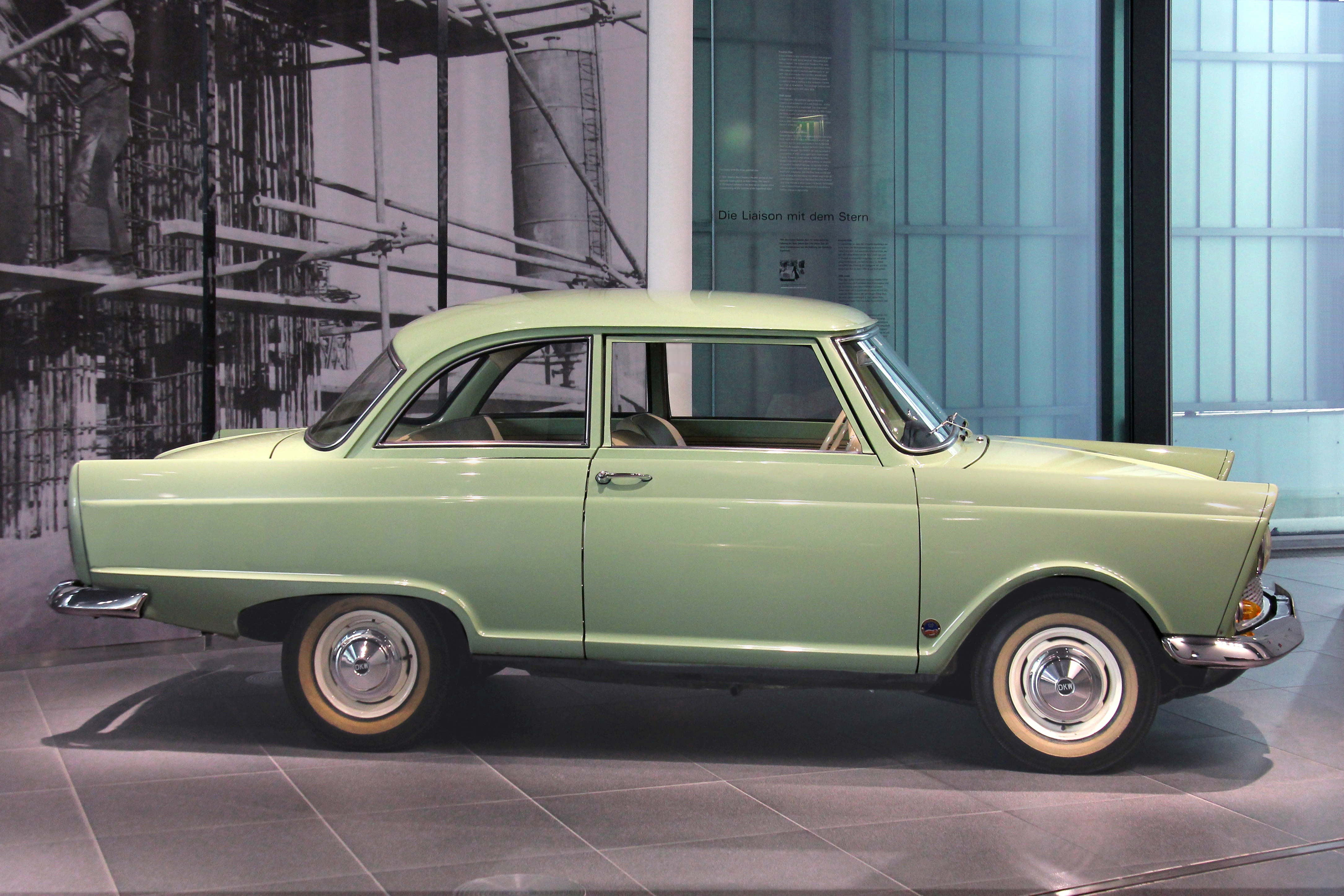 DKW Junior im museum mobile in Ingolstadt. Erste Ausführung von 1959 bis 1962